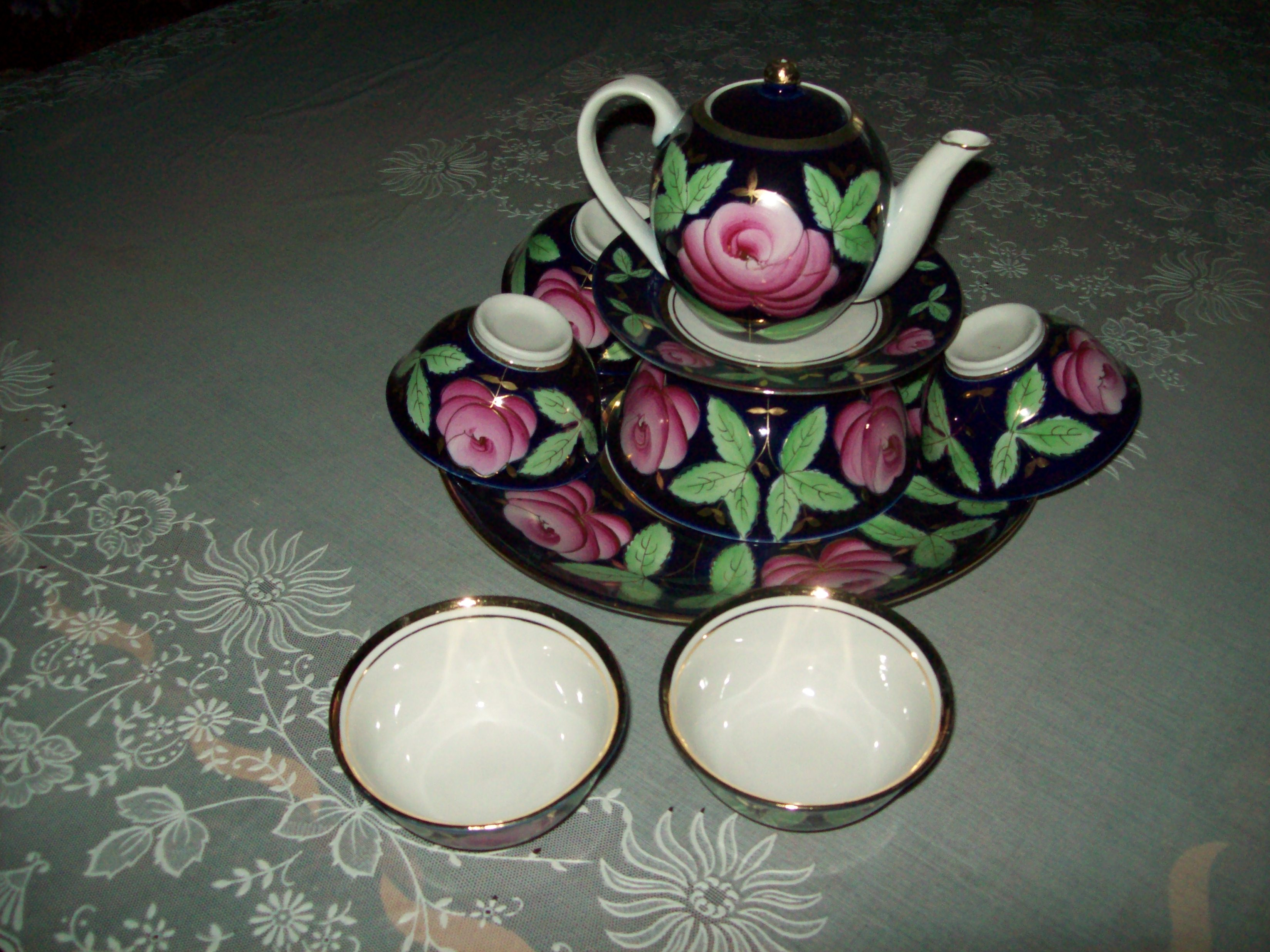 Узбекские национальные сервисный набор (чайник, пиялушки, каса, лягань и тарелка).